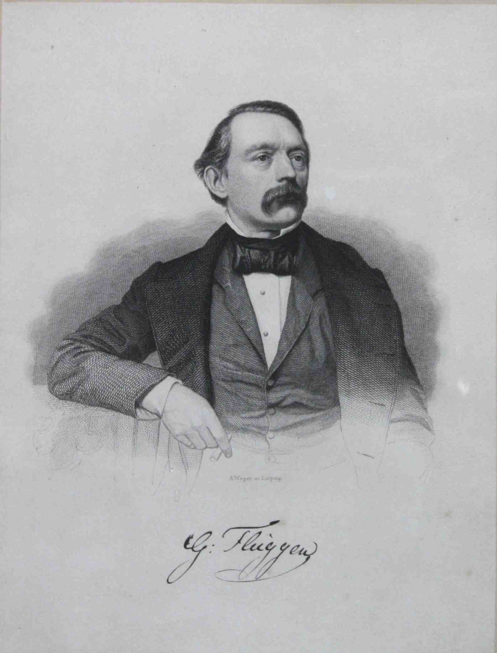 Gisbert Flüggen als Stahlstich von August Weher (1823-1892).